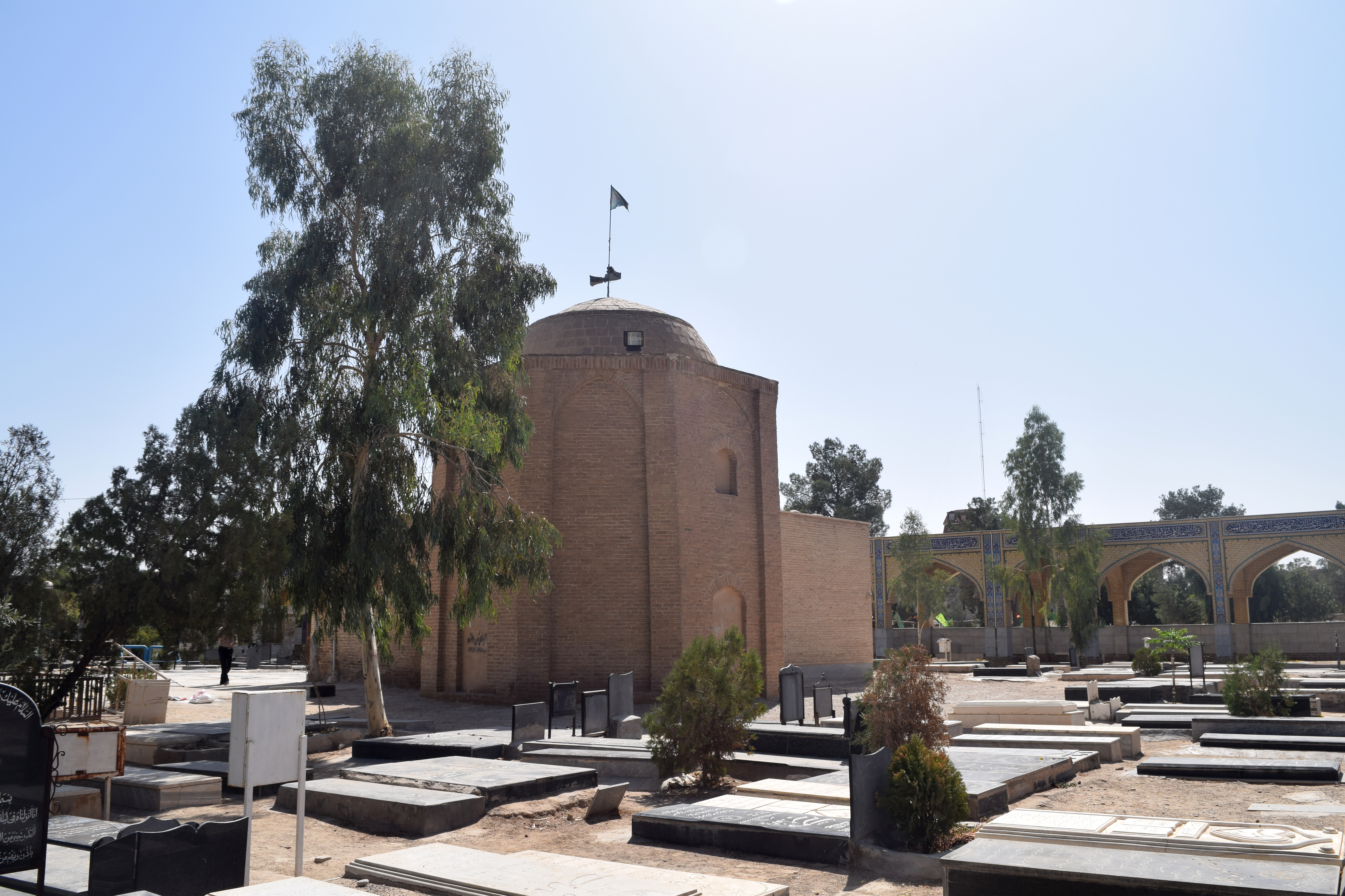 بقعه امامزاده حسین رضا